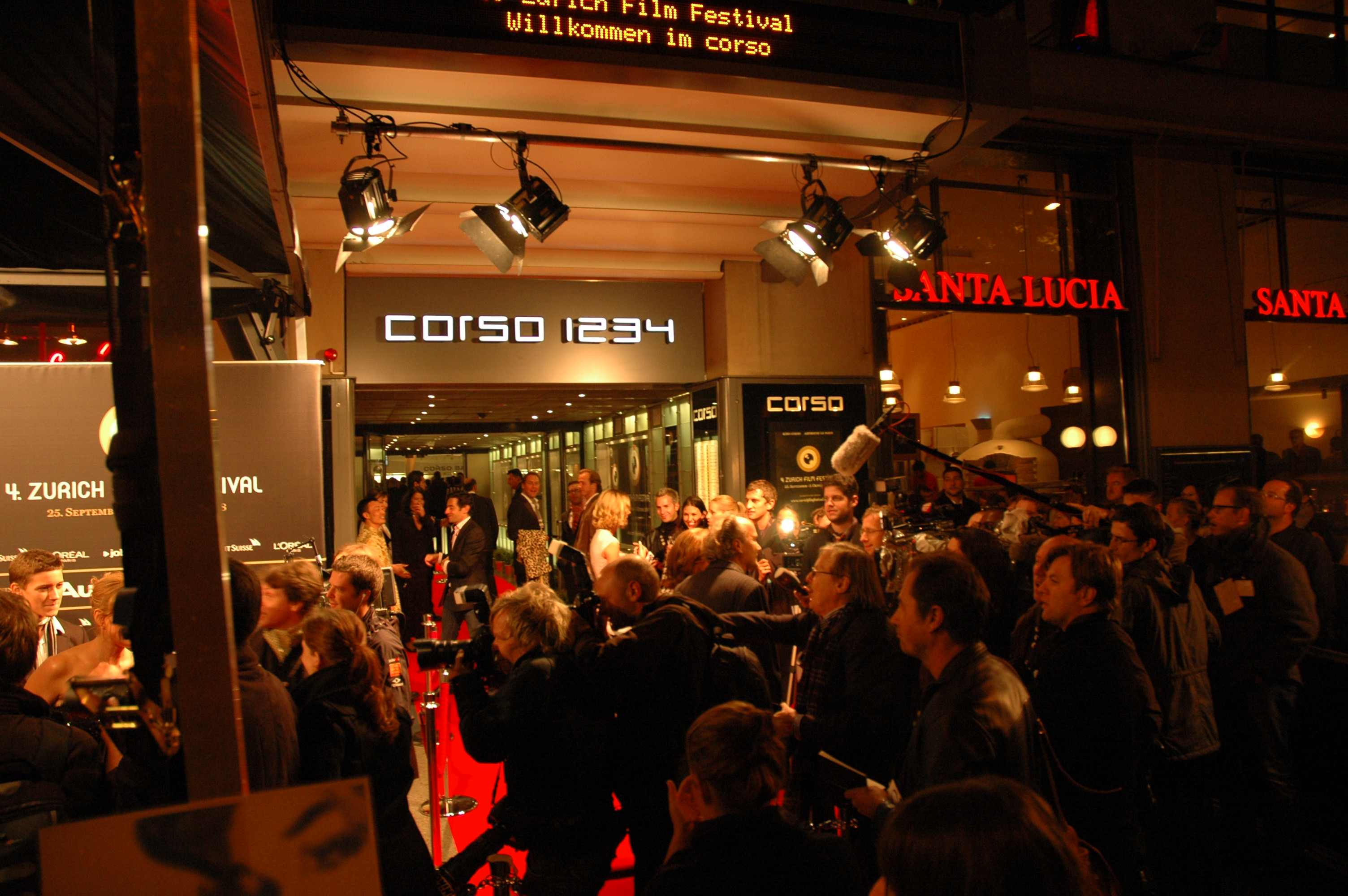 Eröffnung des 4. Zurich Film Festivals 2008 vor dem/im Kino Corso